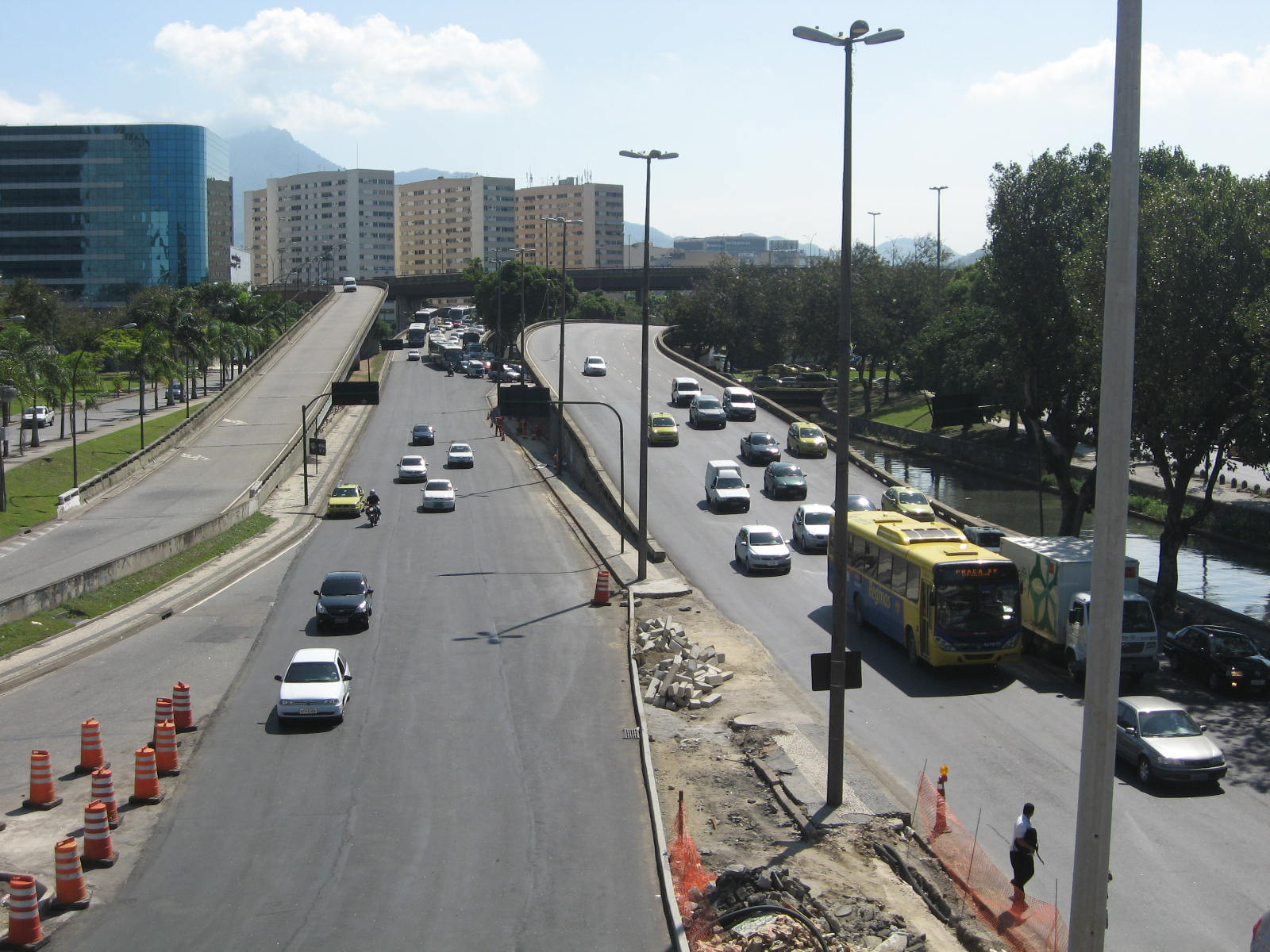 Vista da Av. Presidente Vargas, no Rio de Janeiro.